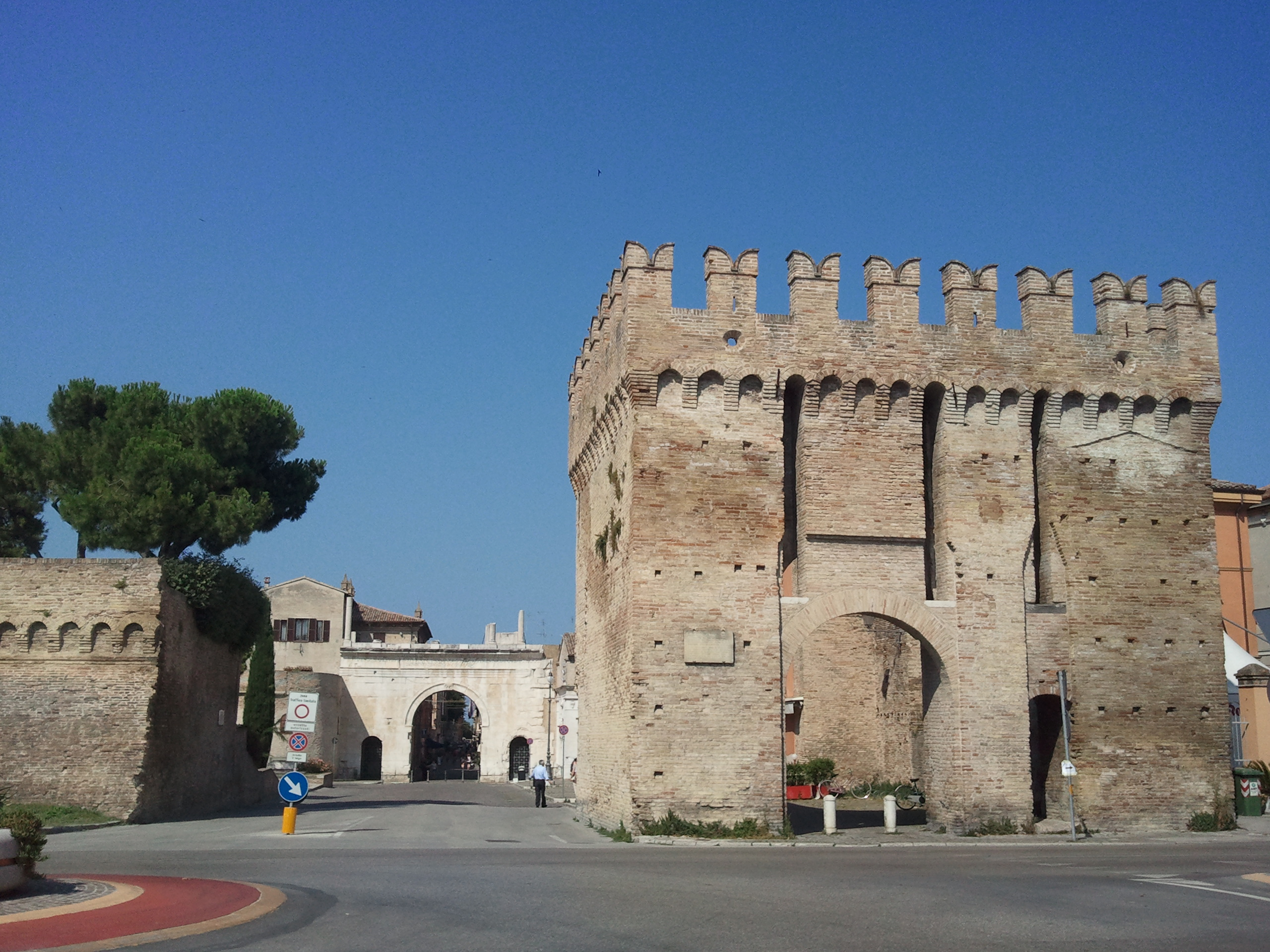 Fano, Porta Maggiore, 1464, e Arco di Augusto